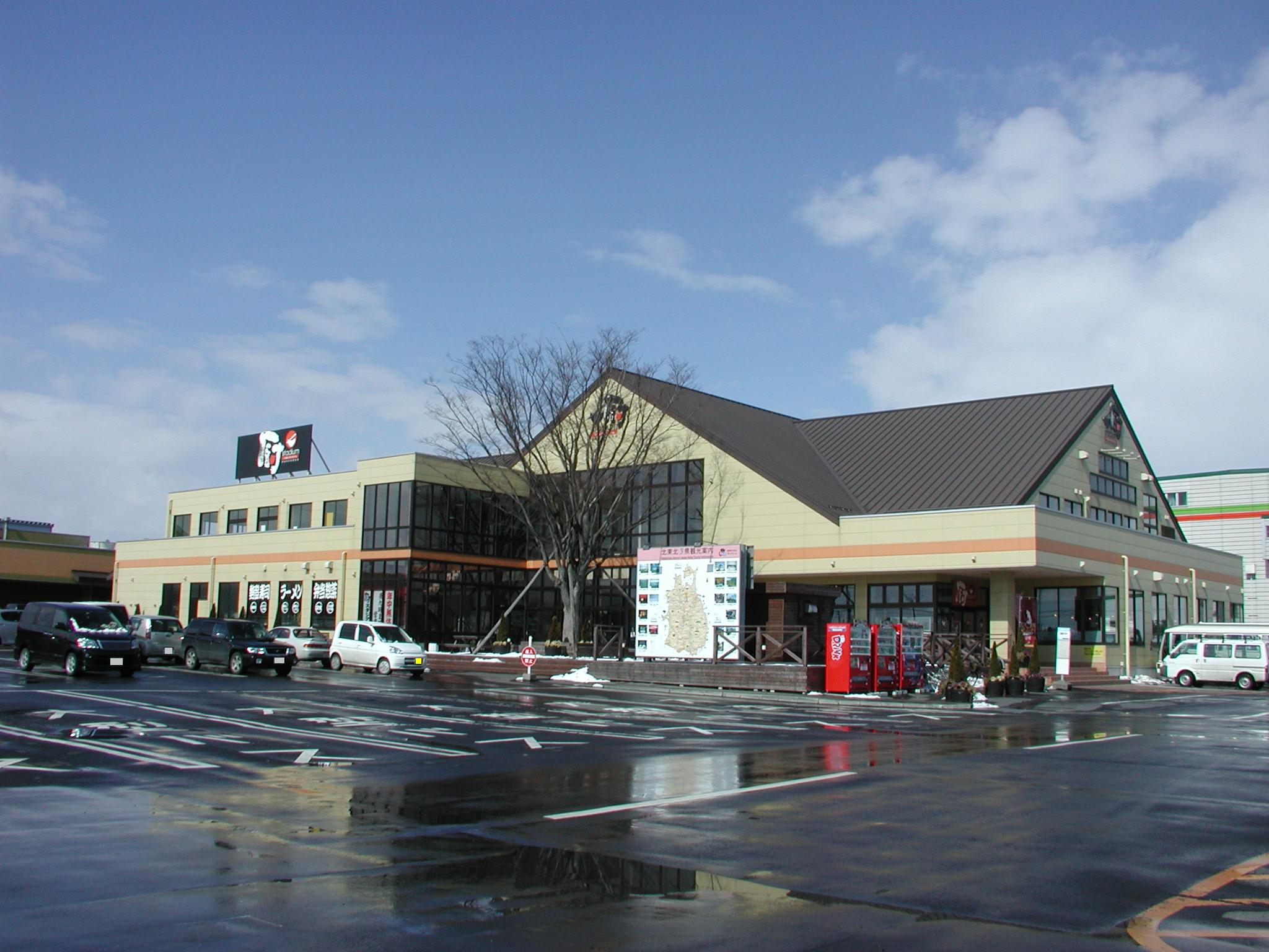 八食センター：厨（くりや）スタジアム棟 ※：自動車ナンバー部分に隠し加工処理済み